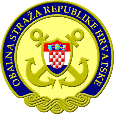 Znak Obalne straže Republike Hrvatske